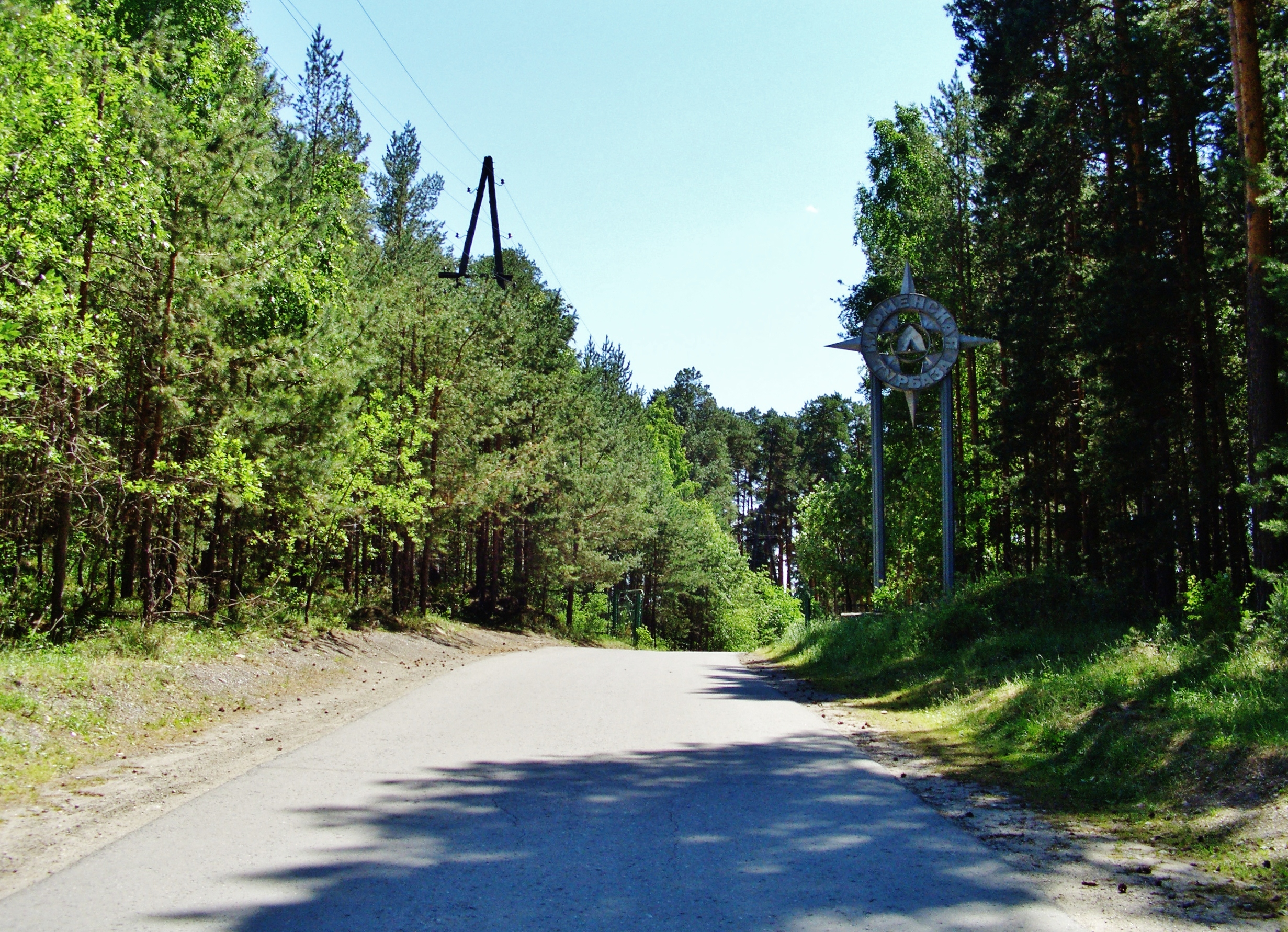 Ильменское озеро.